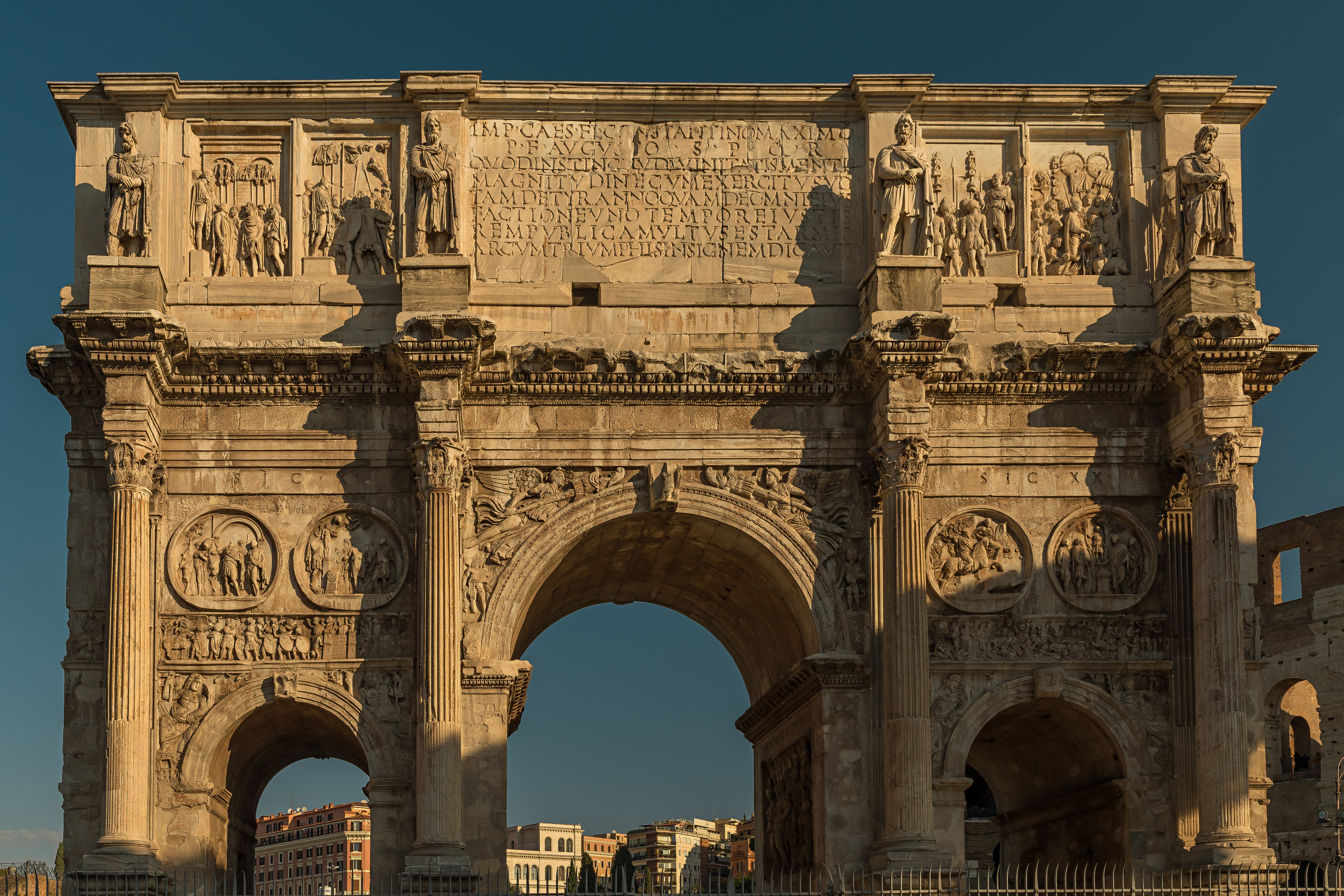 Der Konstantinsbogen in Rom im November 2018